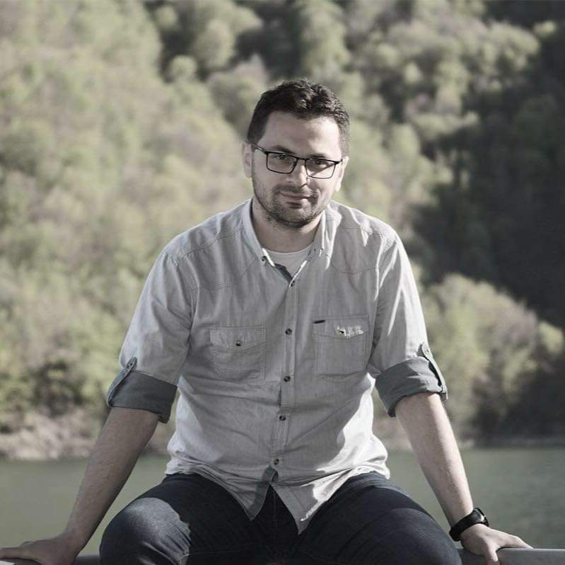 Милутин Попадић (Приштина, 1981) српски песник, теолог и вероучиељ